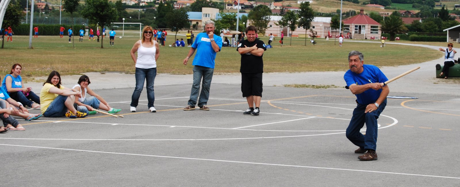 Pepe Pravia, de Quirinal Liriu Sport, na pirmer xonarda del I Campionatu d'Asturies de Liriu (LLamorgal, 18 de xunetu de 2009)